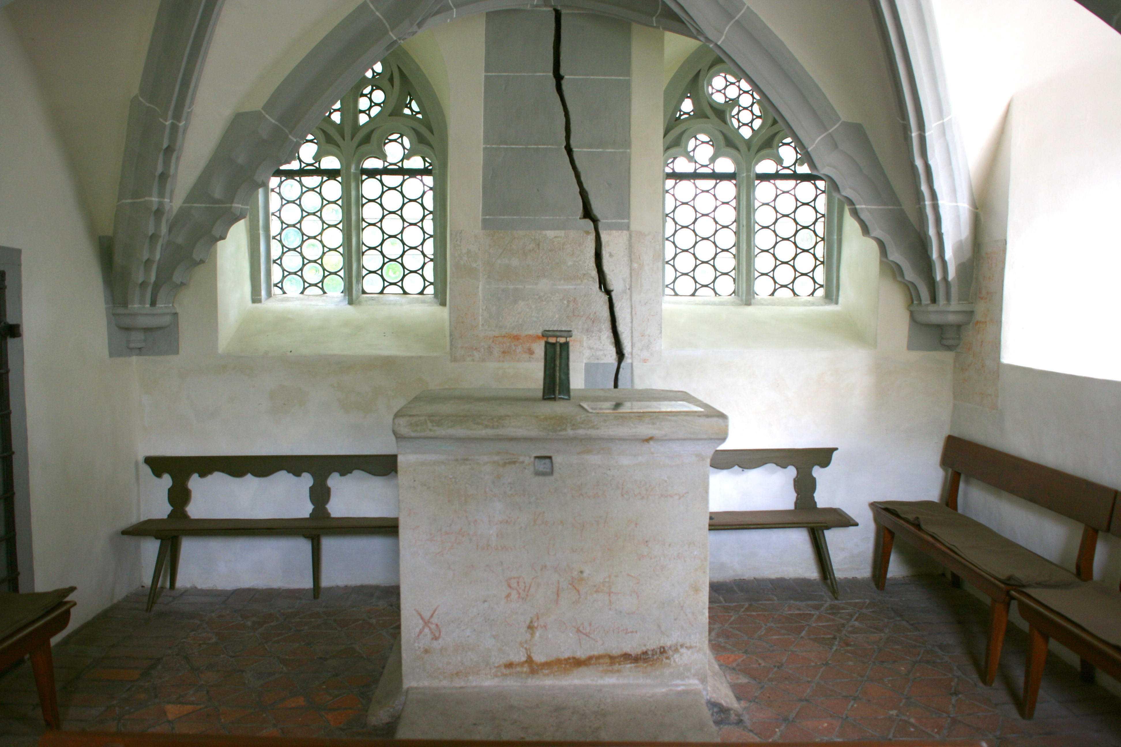 Adamskapelle, Unterkapelle der Heilig-Kreuz-Kapelle in der Anlage Heiliges Grab, Heilige-Grab-Straße in Görlitz